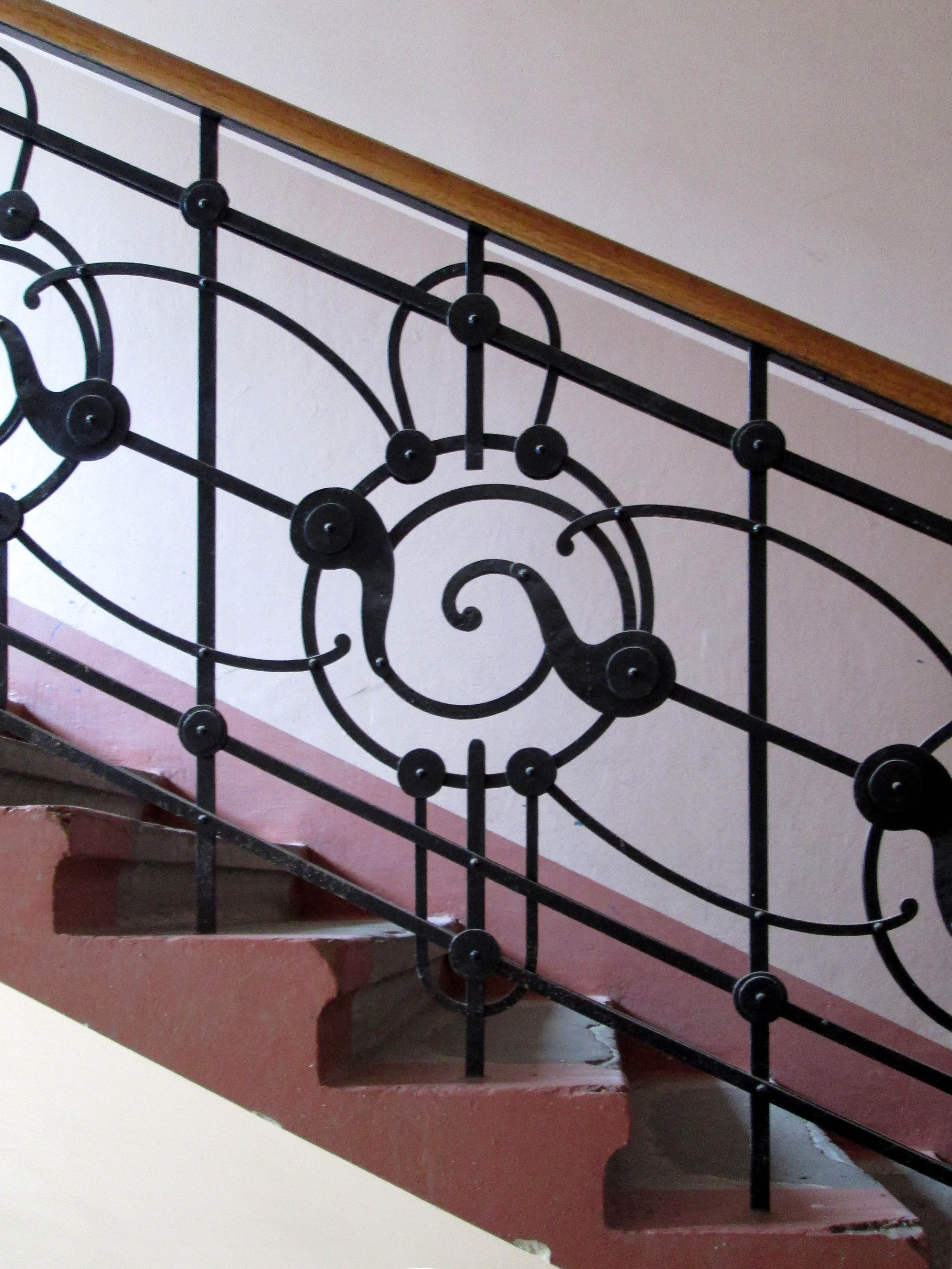 Будинок № 10 на вулиці Донцова у Львові